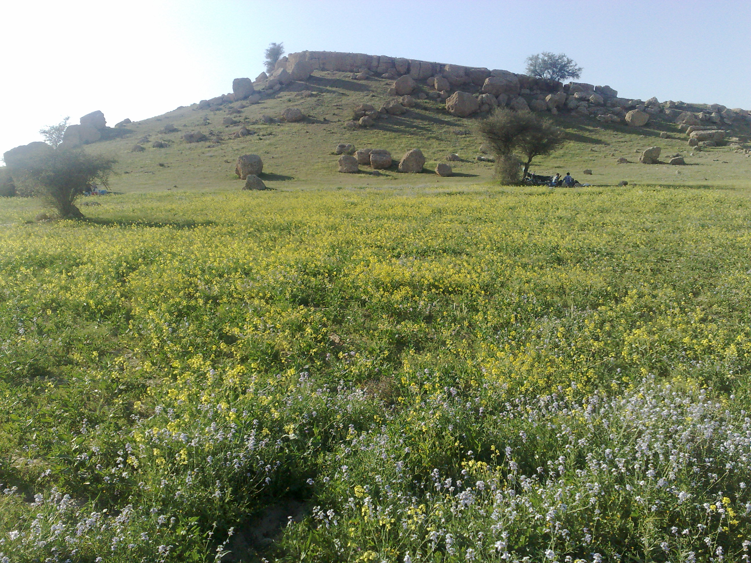 جاده بهبهان به بندر دیلم